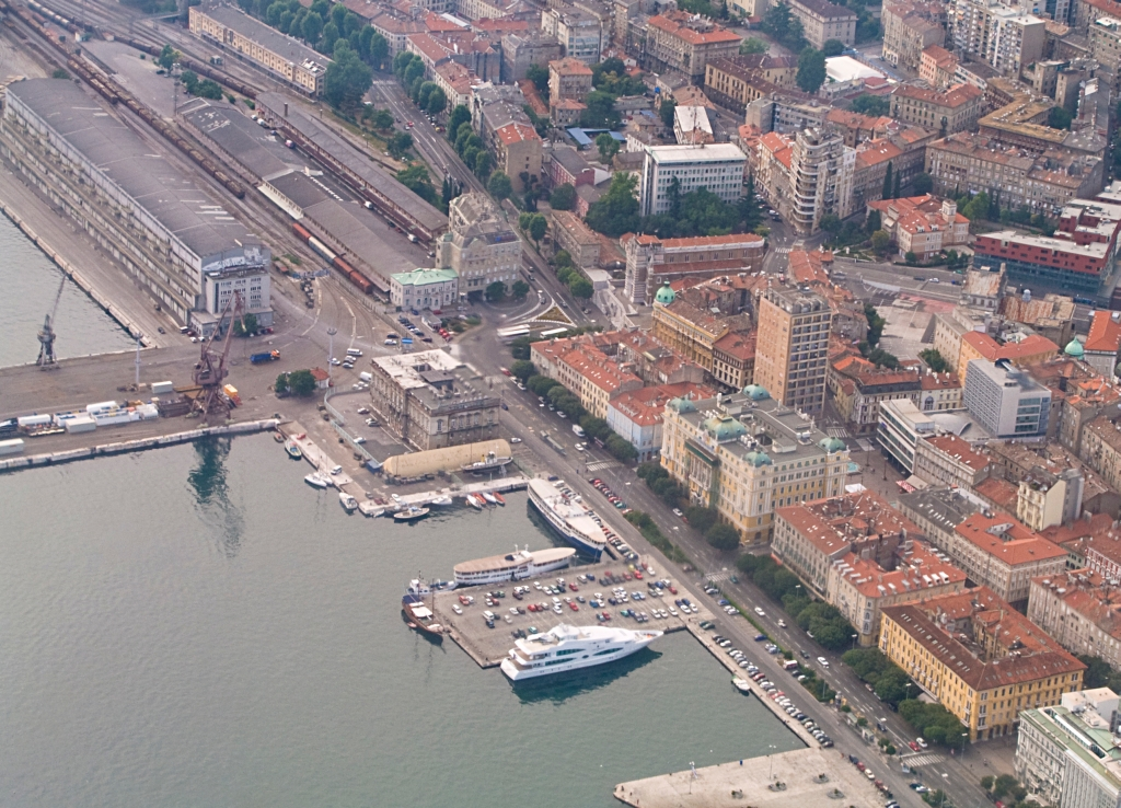 Riječka luka i riva